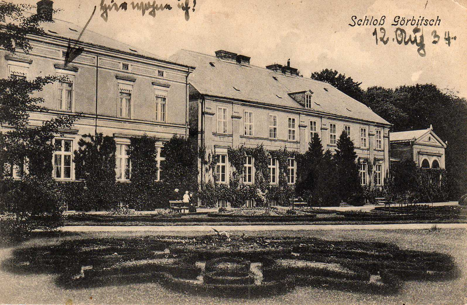 View of the castle of Görbitsch, Germany, Neumark (East Brandenburg), Kreis Weststernberg (since 1945 Garbicz, Poland)